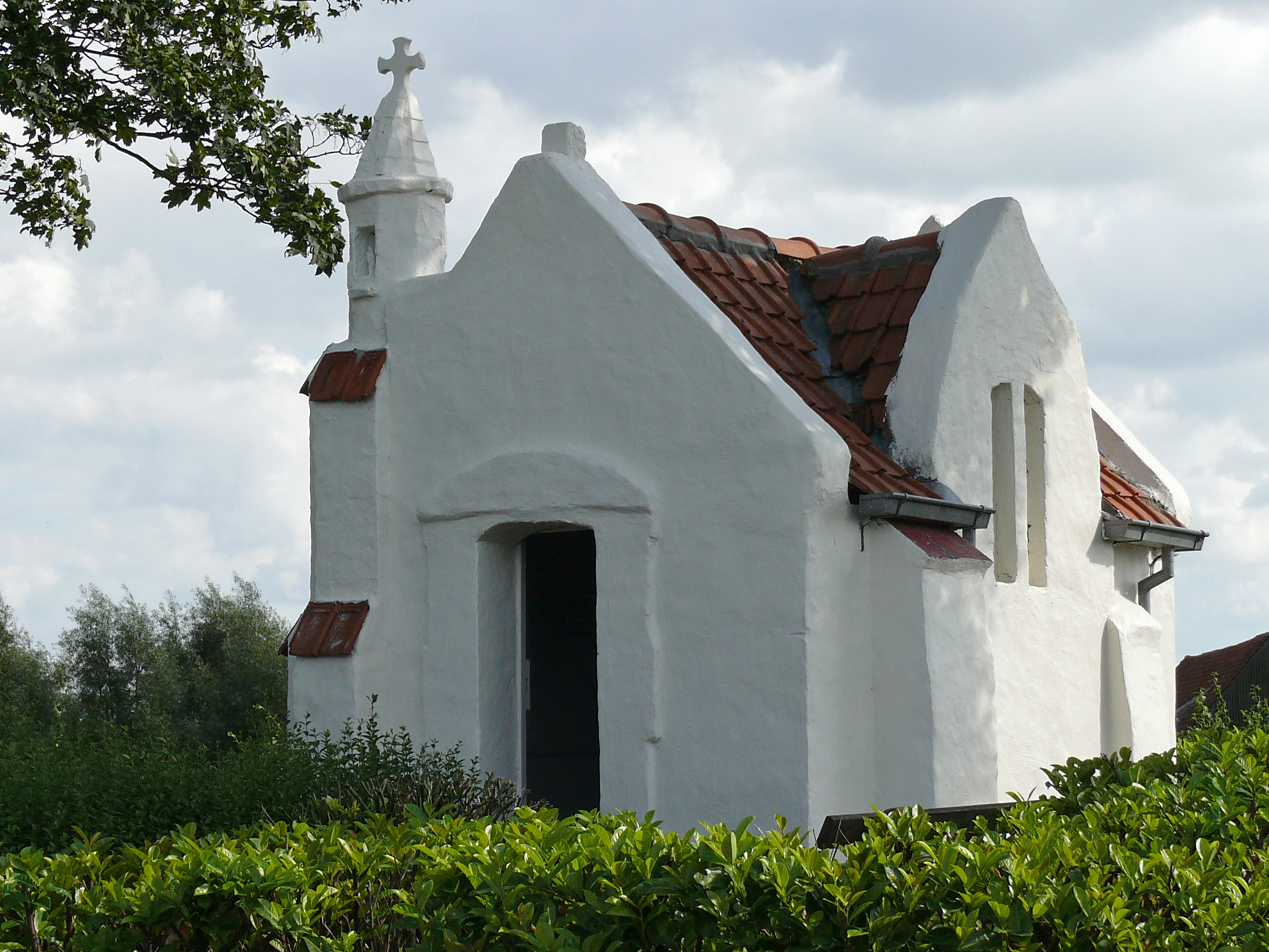 Witgeschilderde bakstenen kapel. Doet oosters aan. Geslaagde inplanting.